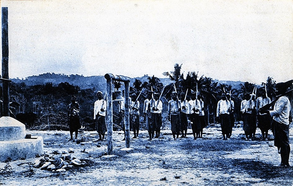 Postal de Timor Leste